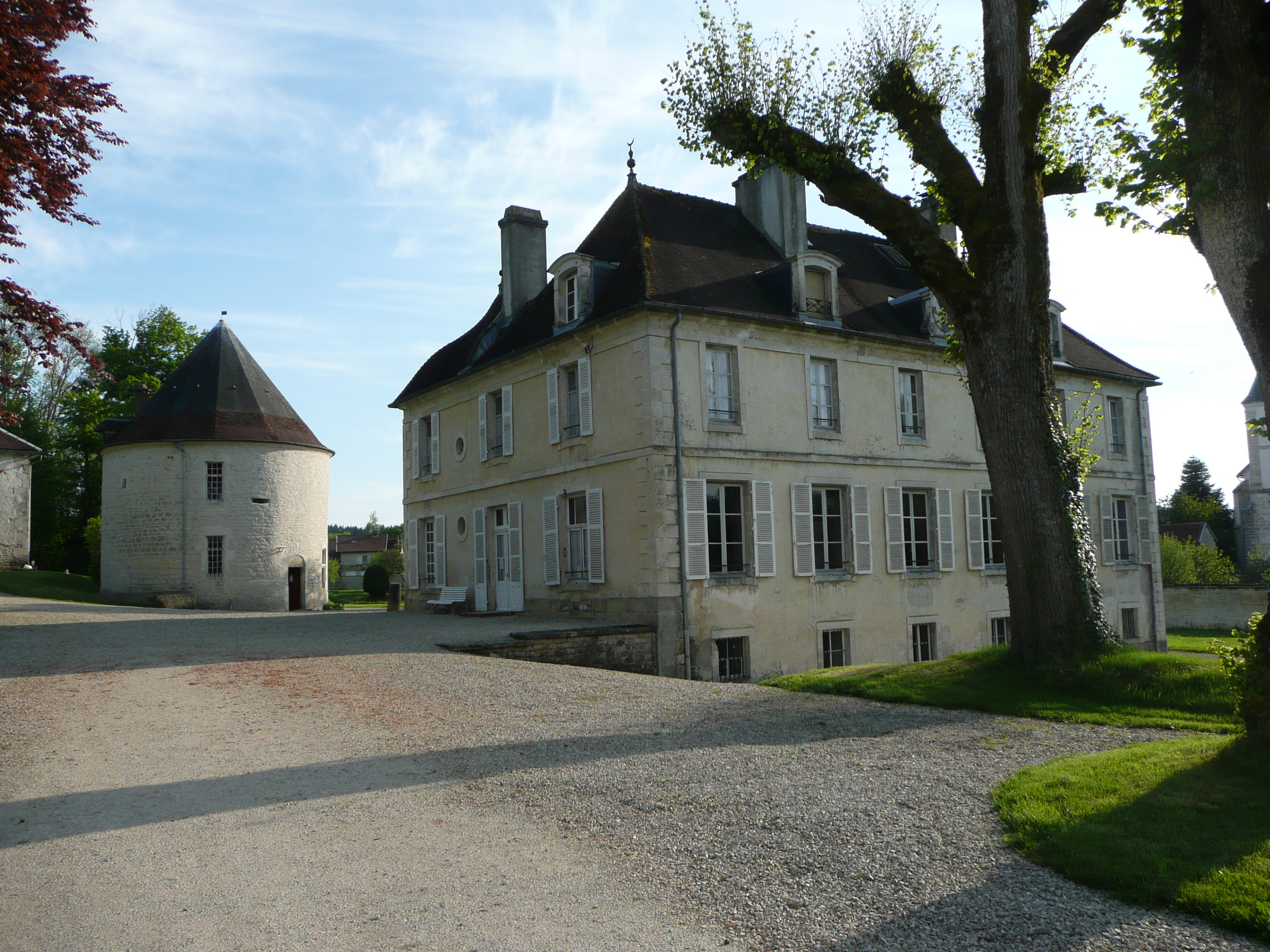 Château de Villars en azois façade nord